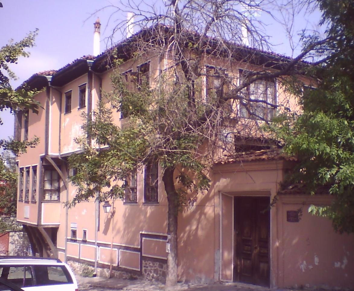 Аҧсшәа: LAMARTINE